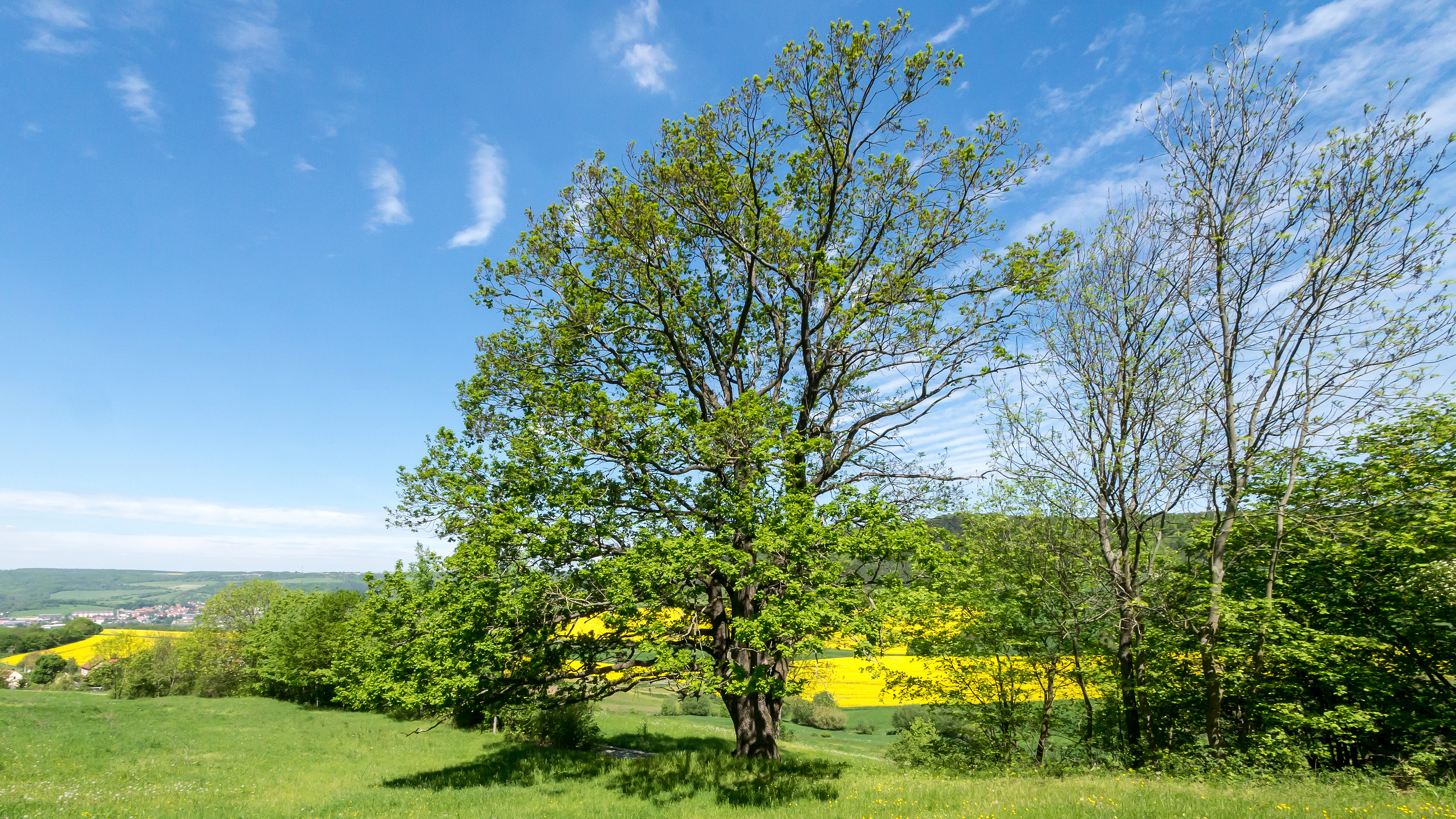 Stieleiche Doc.-Nr. 2006-07 DE-TH Jena-Laasan IV